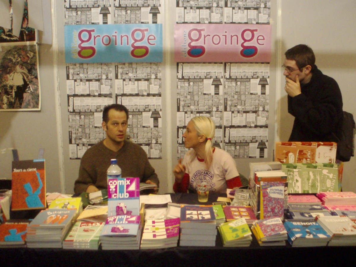 Le stand Groinge au festival d'Angoulême 2007, avec BigBen et Fafé.